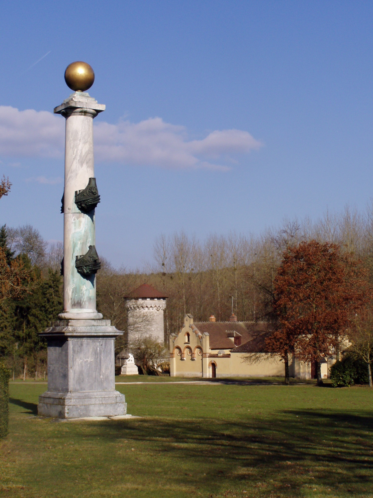 Colonne rostrale en souvenir de l'expédition de La Pérouse; en fond, la ferme d'influence italienne et le pigeonnier dans le parc de Jeurre (Essonne - France) Photo personnelle J. THURION (Belgavox) du 12 mars 2006